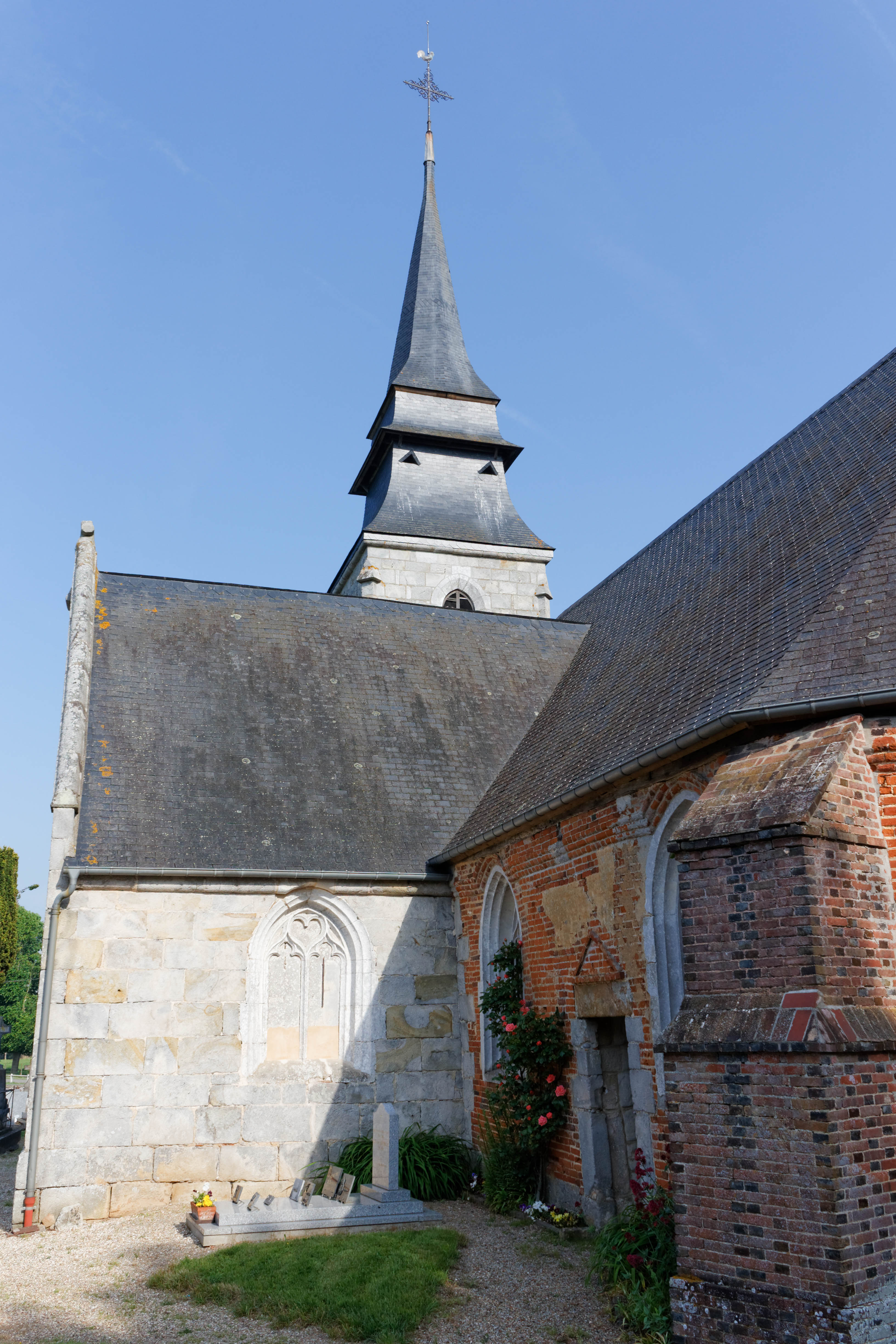 Vue extérieure de l'église Notre-Dame du Chamblac.